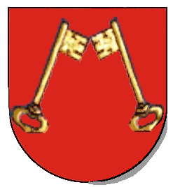 herb Podskarbiego Rzeczypospolitej author User:Mathiasrex -Maciej Szczepańczyk